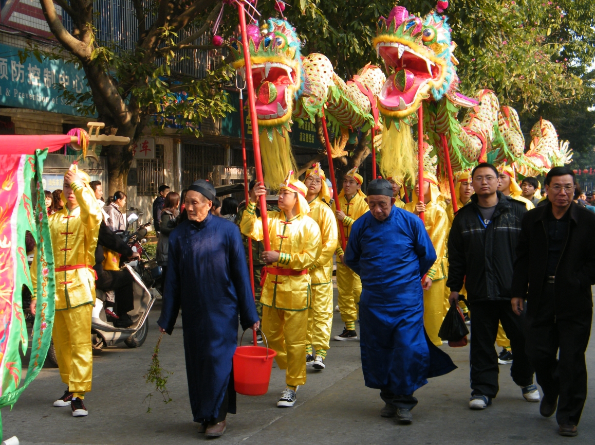 达濠2011正月初一巡游